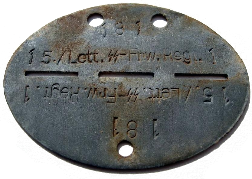 Жетон солдата 15-й гренадерской дивизии СС (1-й латвийской)